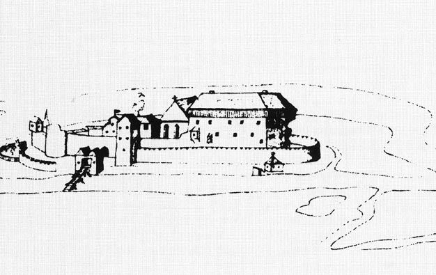 Zamek Piastowski w Raciborzu na początku XVII wieku